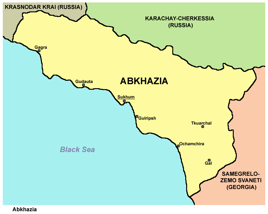 map of Abkhazia.